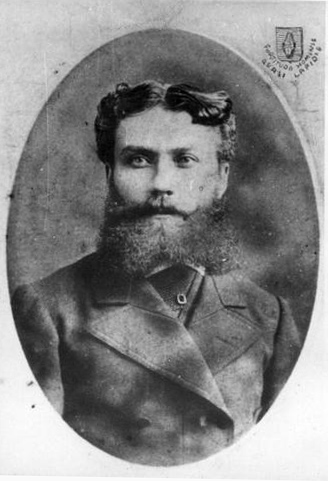 Francois_van_Steenkiste